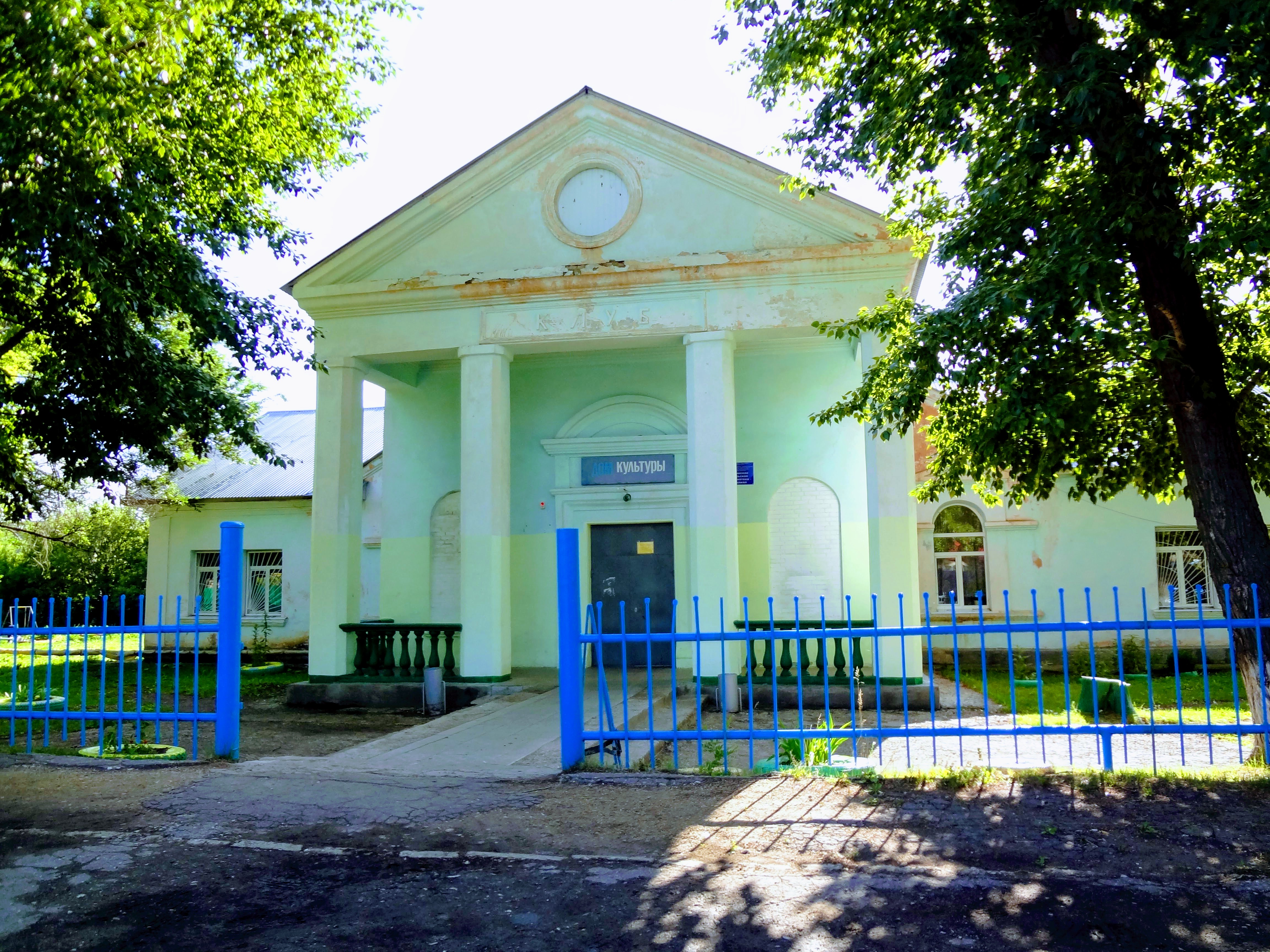 Дом Культуры. Библиотека. Поселок Осинки Самарская область